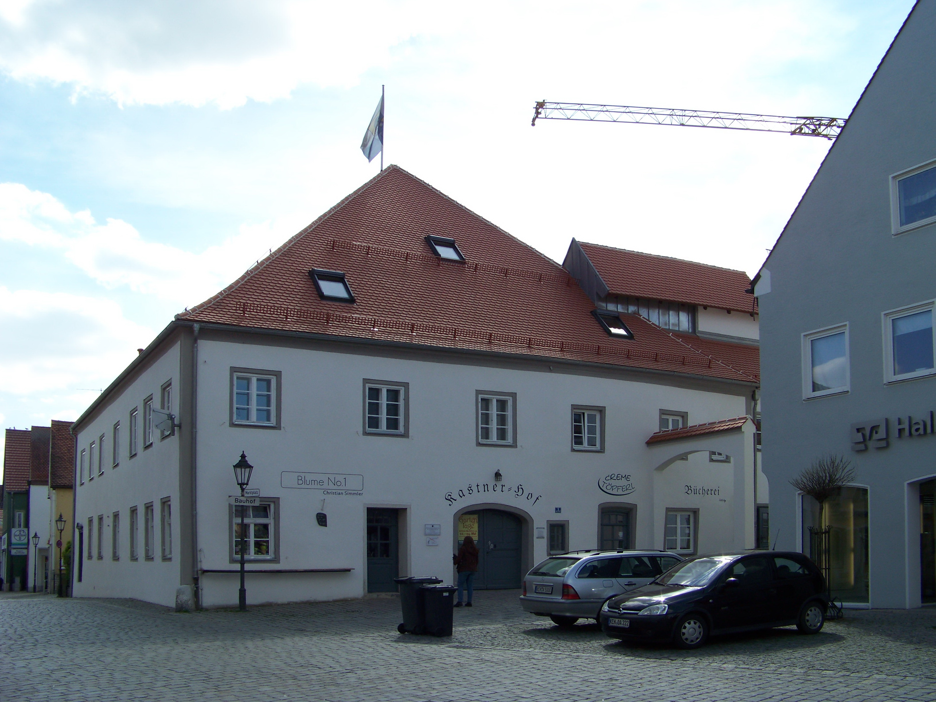 Langquaid, Marktplatz 1. Kastnerhof. Ehemaliges Wohnhaus. Nach der 2013 abgeschlossenen Renovierung Geschäftshaus. Zweigeschossiger, verputzter Massivbau mit Walmdach, 18. Jahrhundert; Kelleranlage, 18. und 19. Jahrhundert.